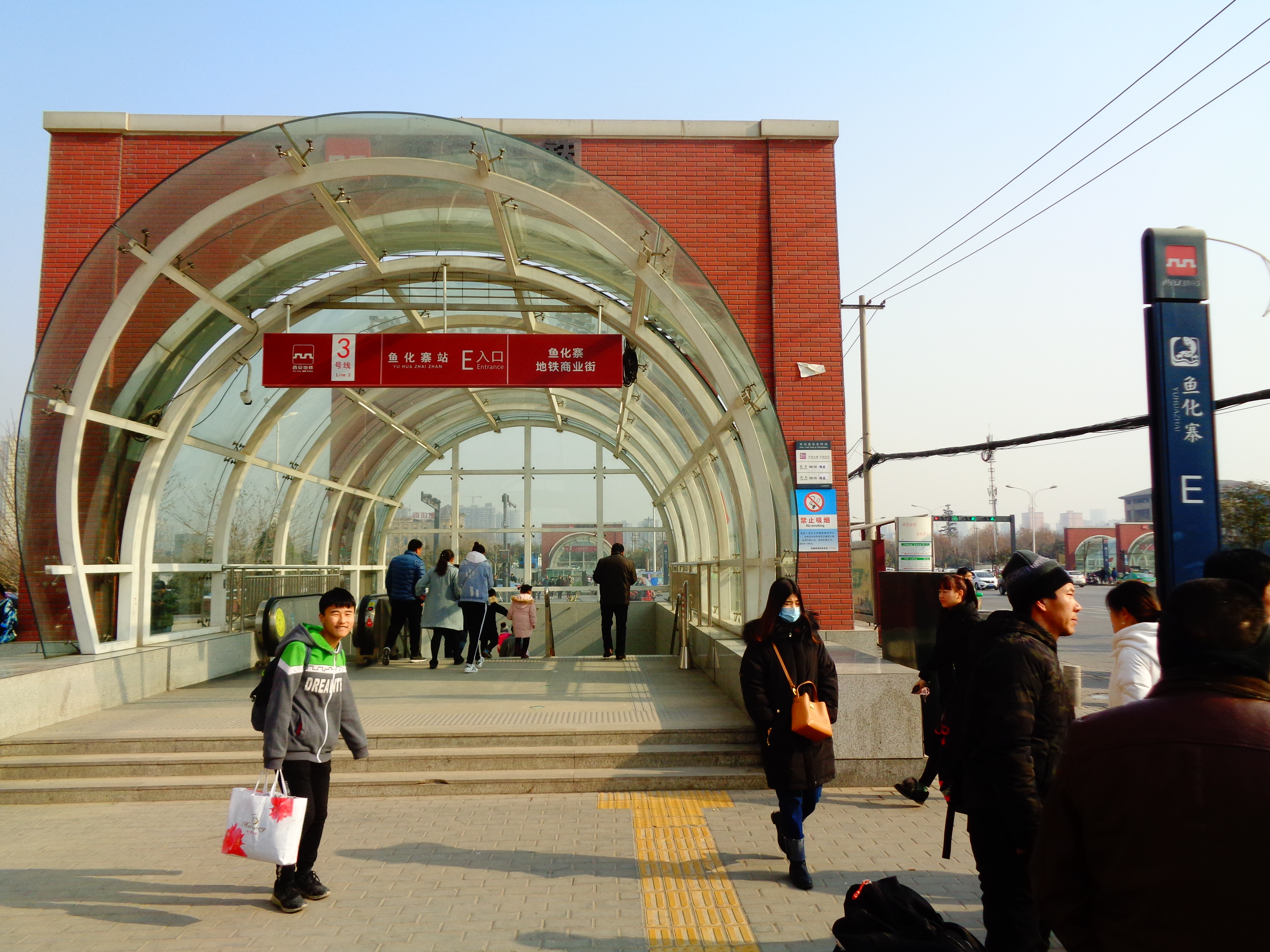 西安地铁三号线鱼化寨站